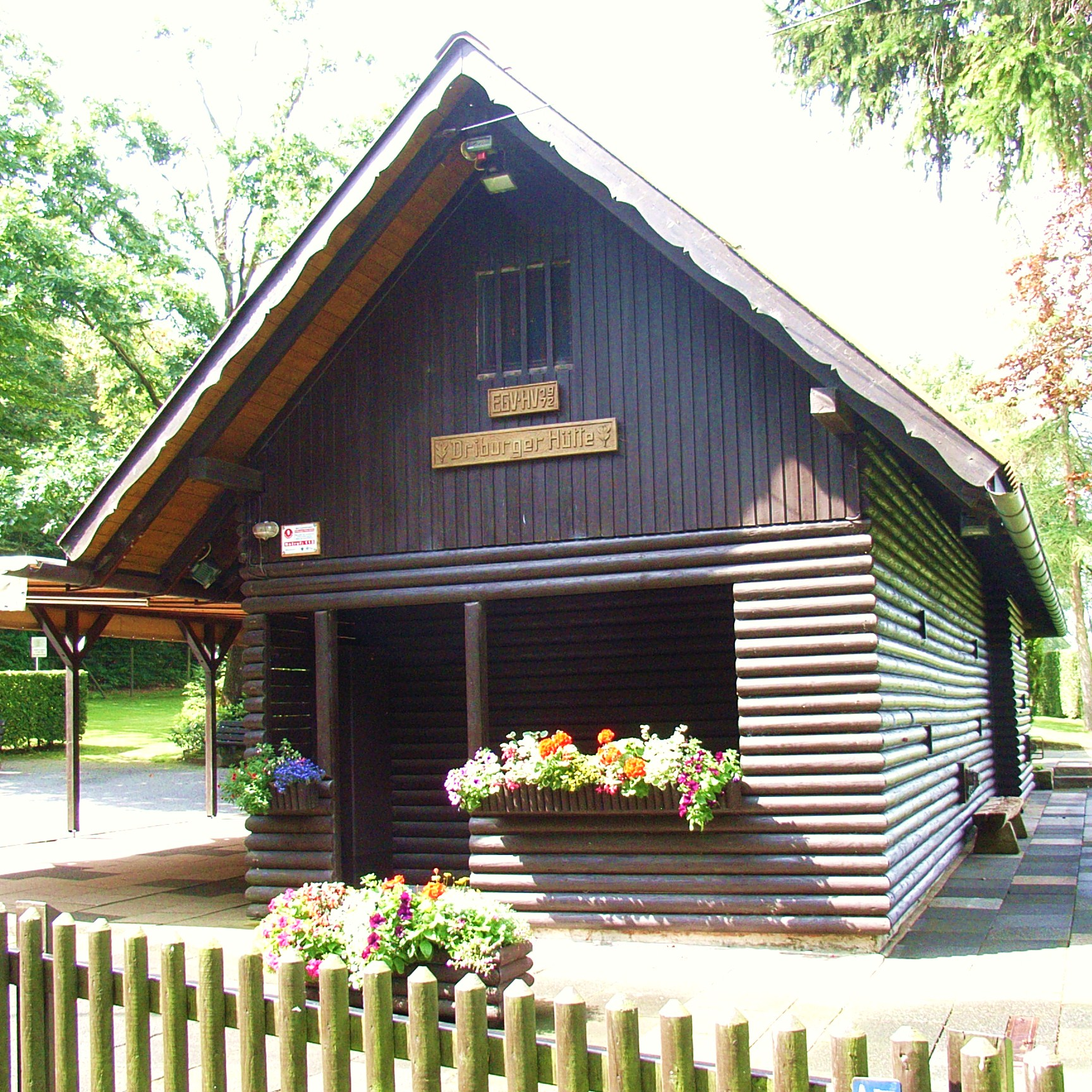 Die Driburger Hütte des EGV